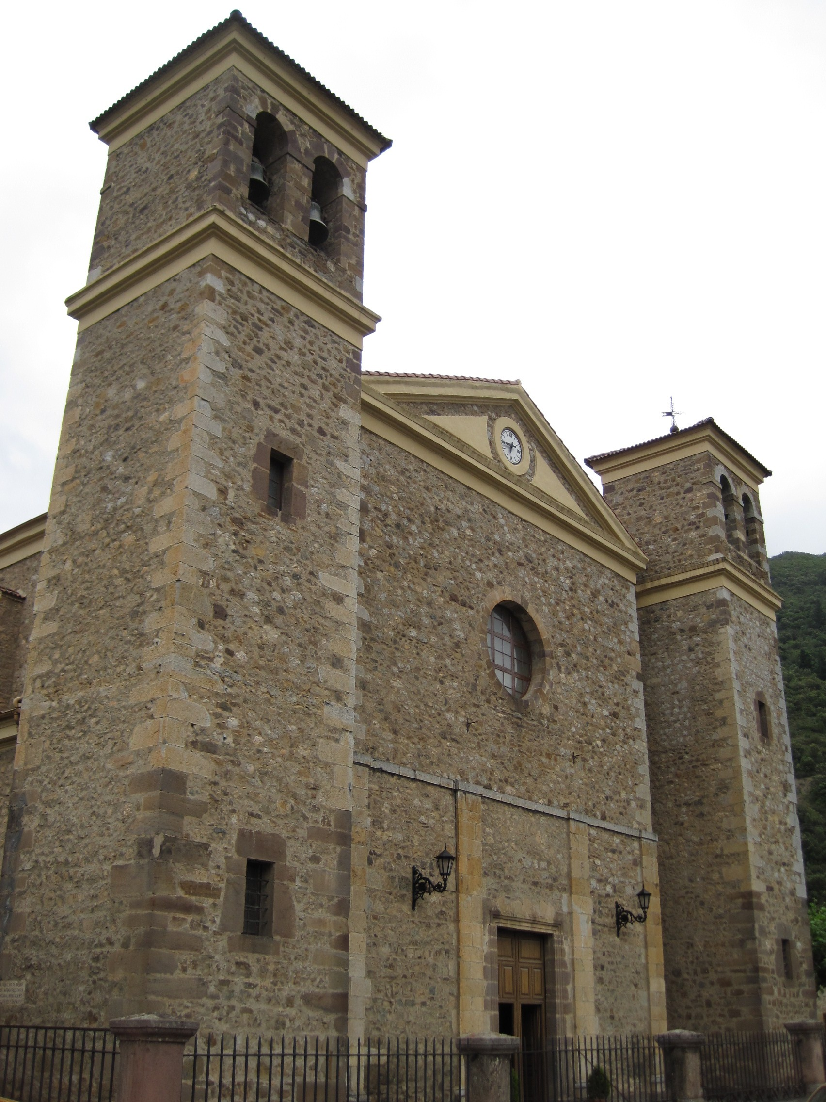 Fachada de la iglesia nueva de San Vicente, en Potes (Cantabria, España).